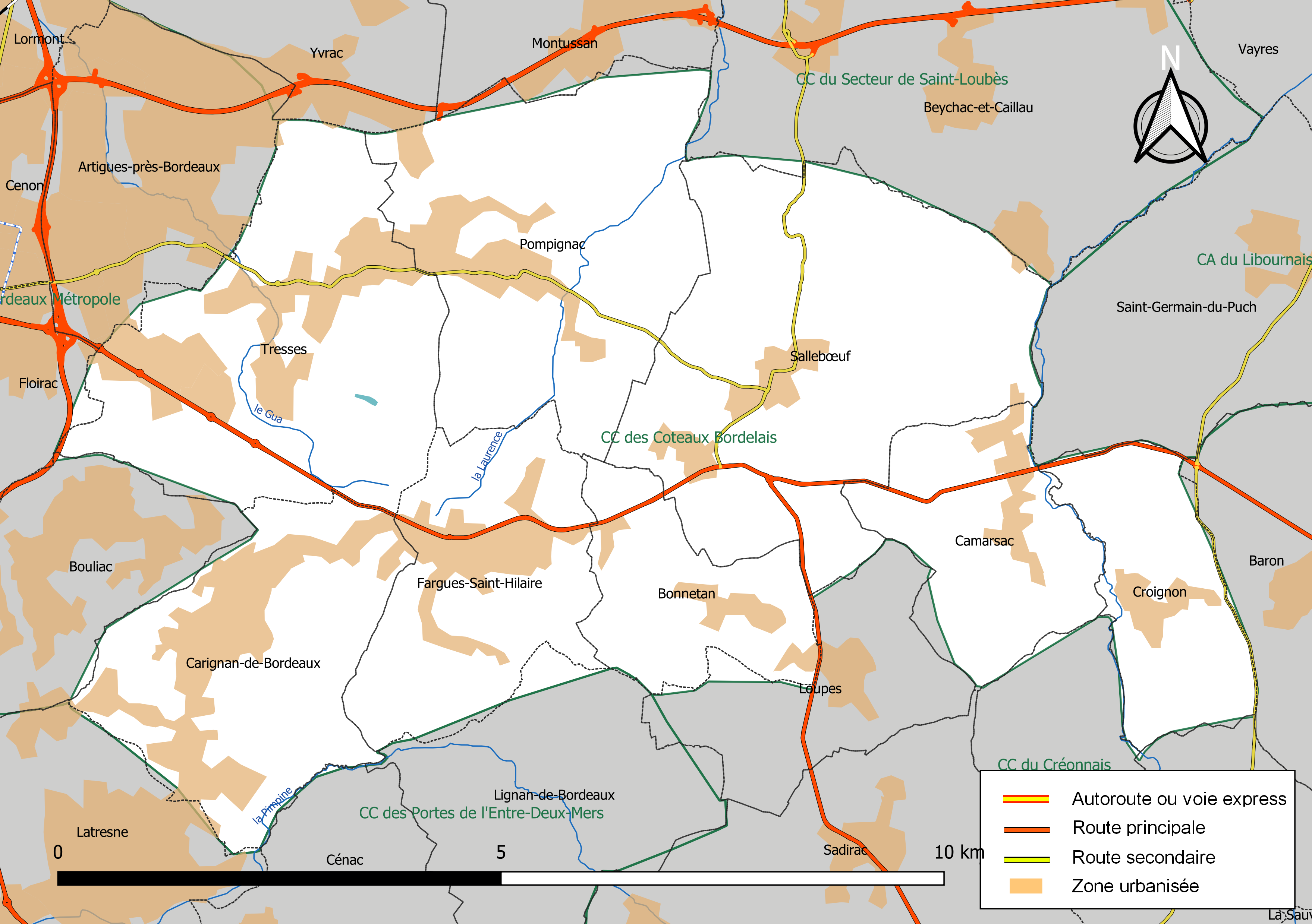 Carte géographique de la Communauté de communes des Coteaux Bordelais, département de la Gironde, France. Composition au 1er janvier 2019.